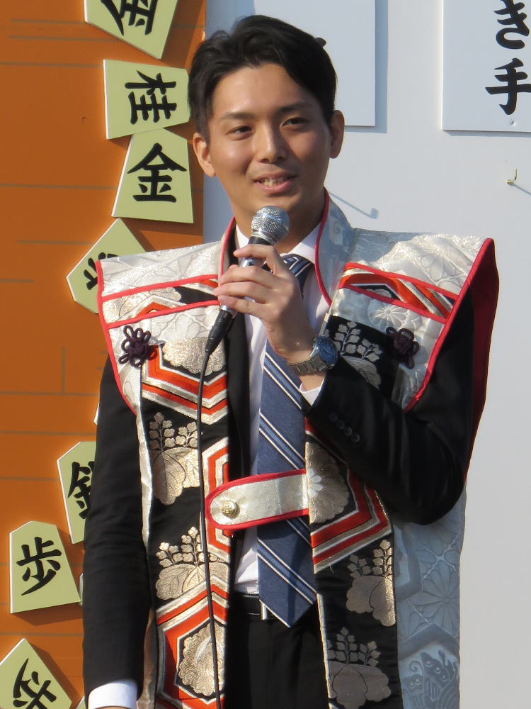 将棋棋士の都成竜馬（平成２９年１１月、姫路市で行われた人間将棋にて）